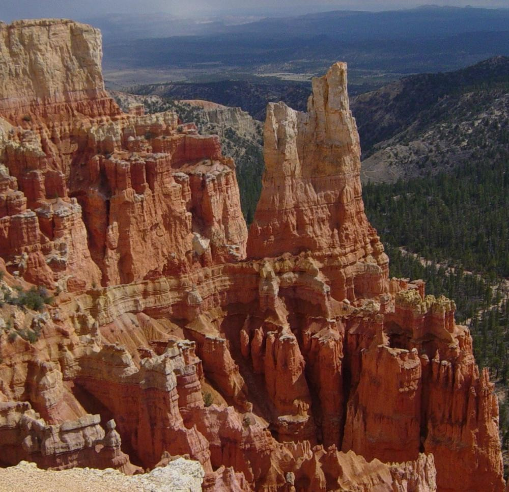 Blick auf Hoodoos im Bryce Canyon